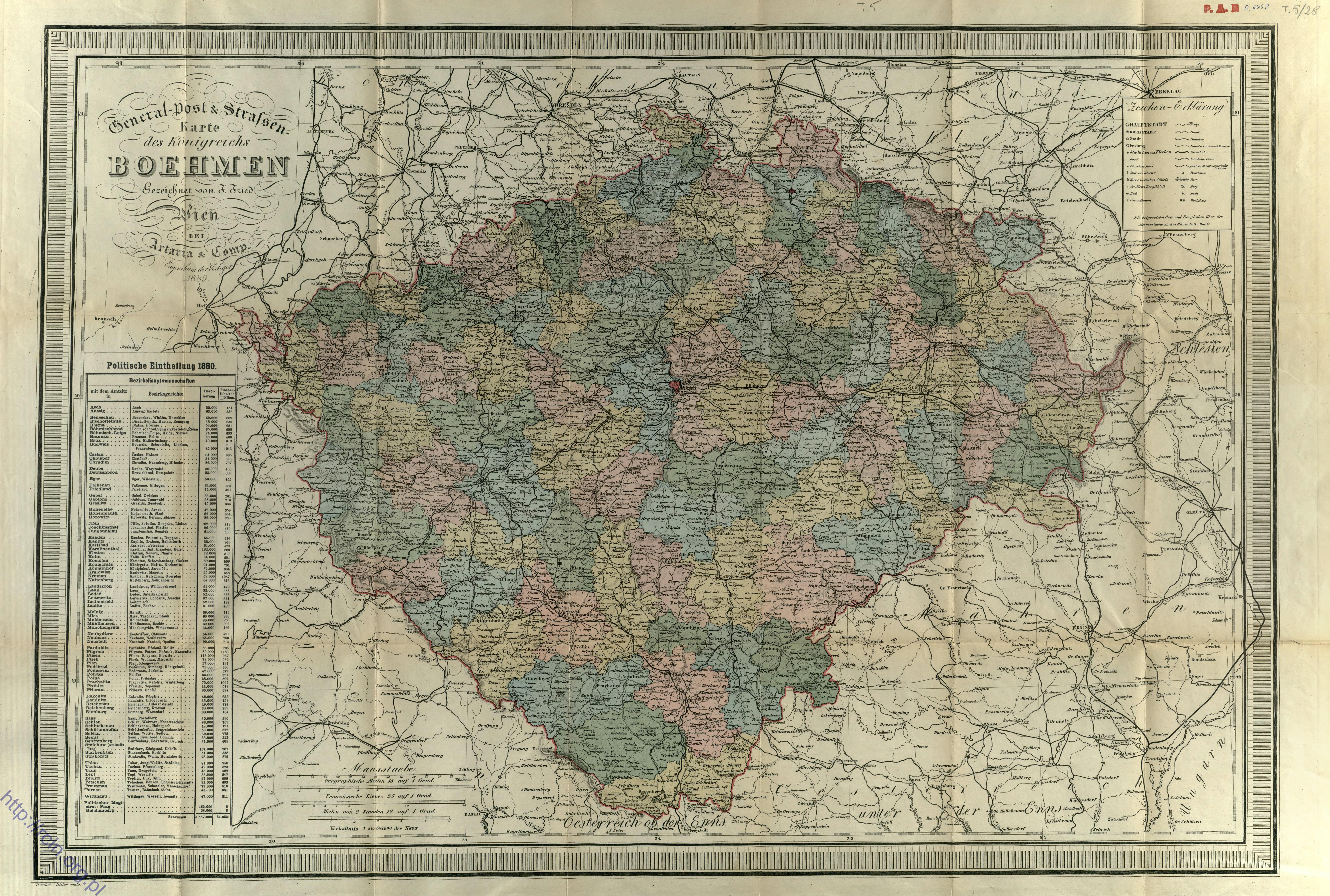 Karte von Böhmen, heute Tschechien, mit Gliederung in 91 Bezirkshauptmannschaften (Kreise) einschl. Statistik (Fläche und Bevölkerung) (104 Politische Bezirke lt. [1])